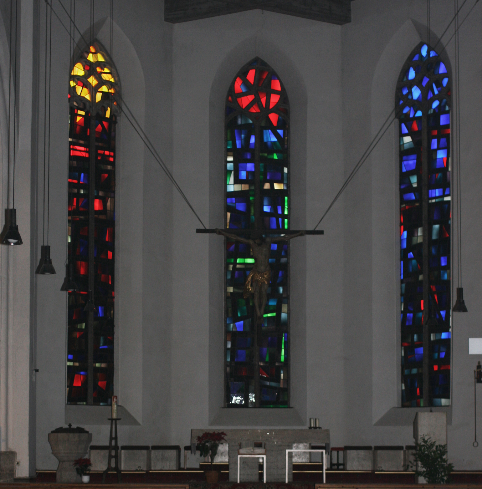 Blick zum Chor der Stadtpfarrkirche Sankt Gregor (Kirchdorf/Krems) mit spätgotischem Kruzifix und modernen Buntglasfenstern. Die Buntglasfenster entwarf Lydia Roppolt.